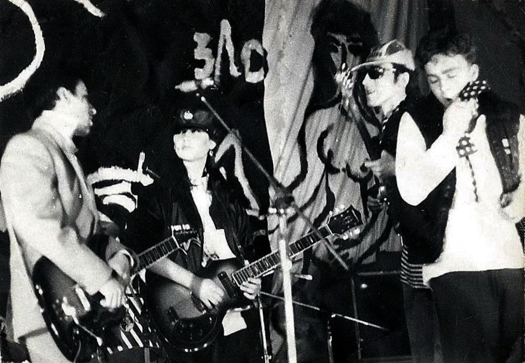 Группа «НКВД» («Зазеркалье»), рок-фестиваль «Закрытая зона», Ростов-на-Дону, 1989 г.